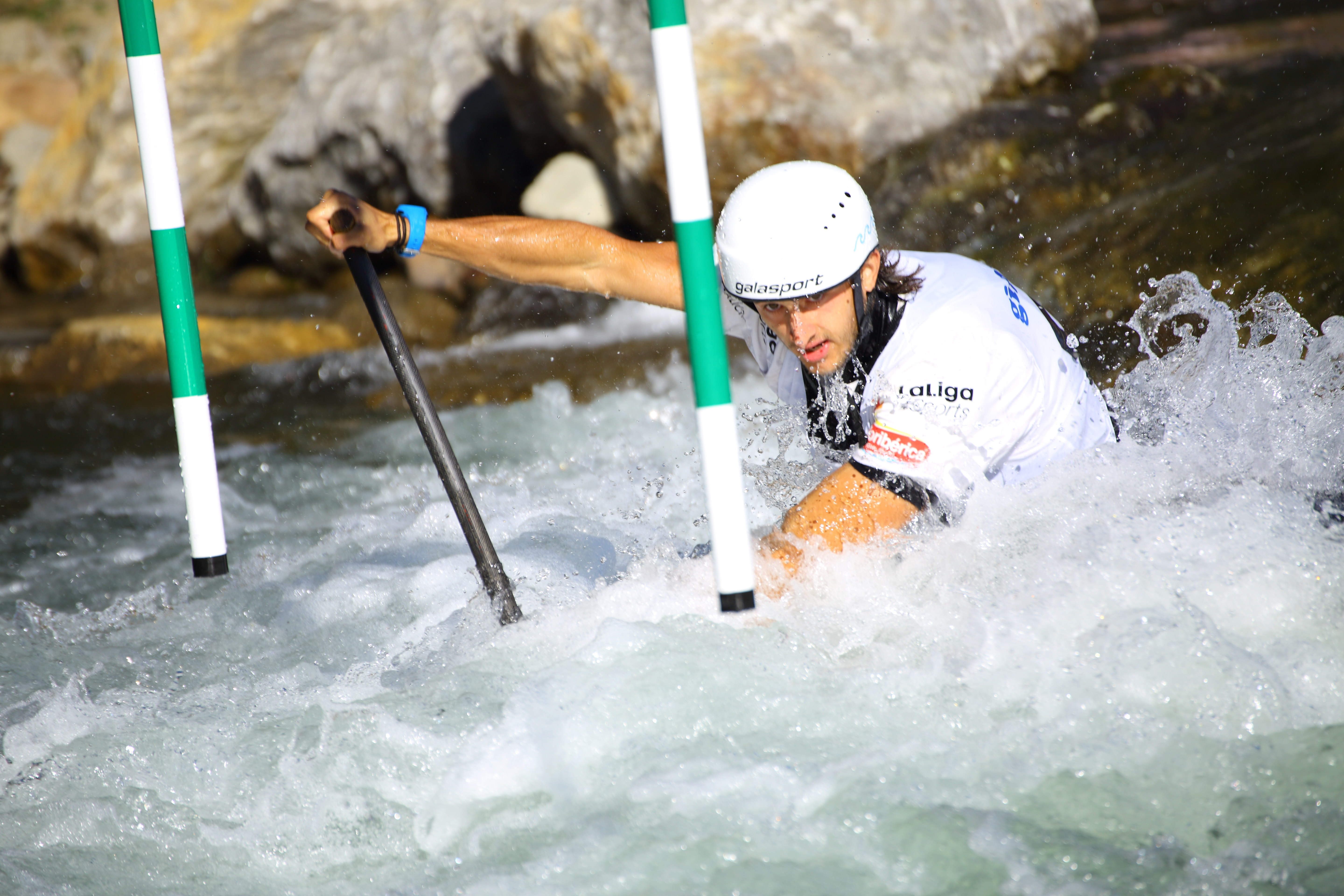 Alejico, Sabero, Leon. Celebrado el 5 y 6 de agosto